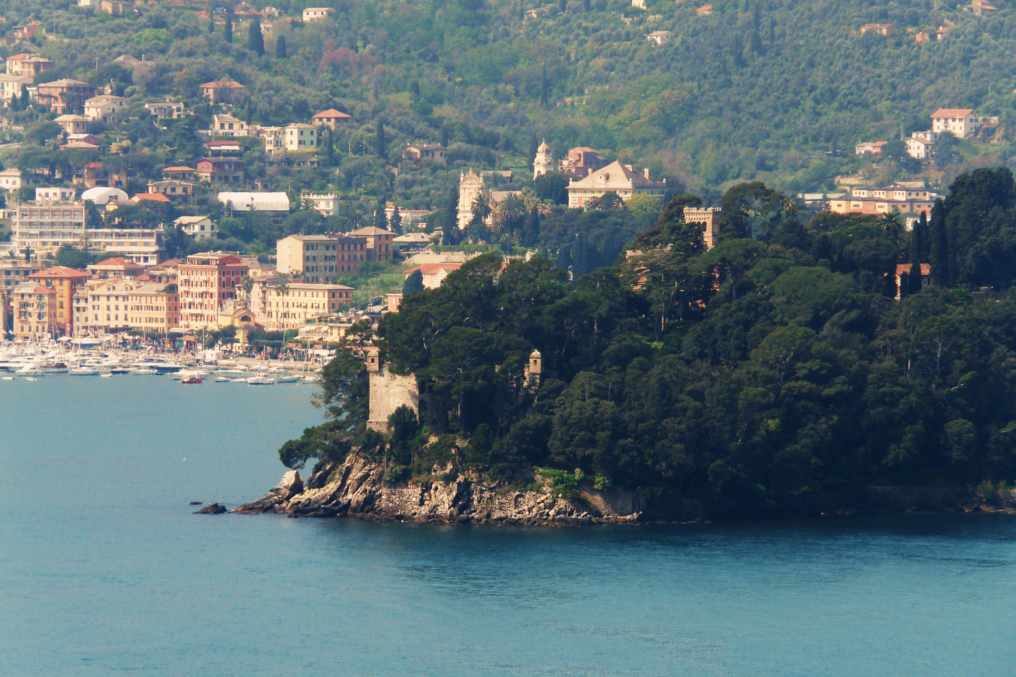 Torre del castello di Pagana, Rapallo, Liguria, Italia